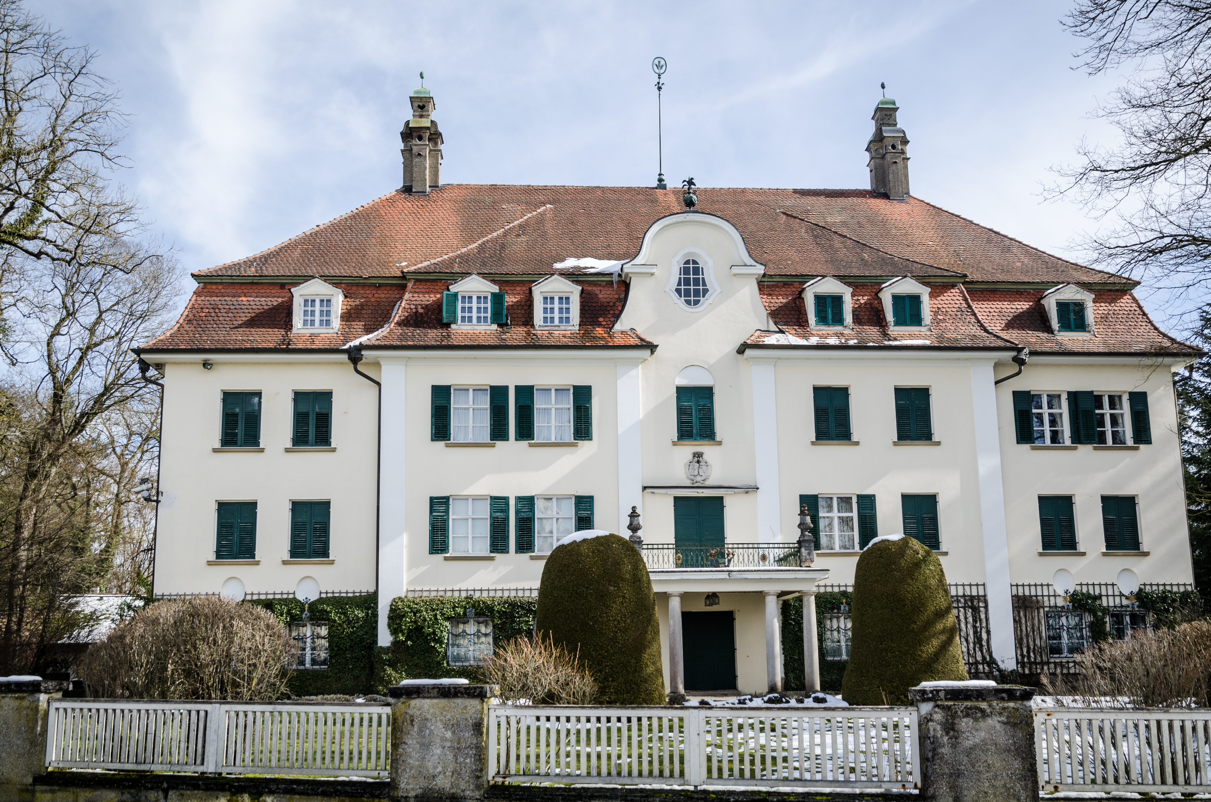 Roggenburg, Schloß